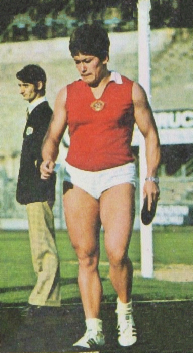 CAMPIONI dello SPORT 1973/74-Figurina n.22- MELNIK - URSS -ATL.LEGGERA